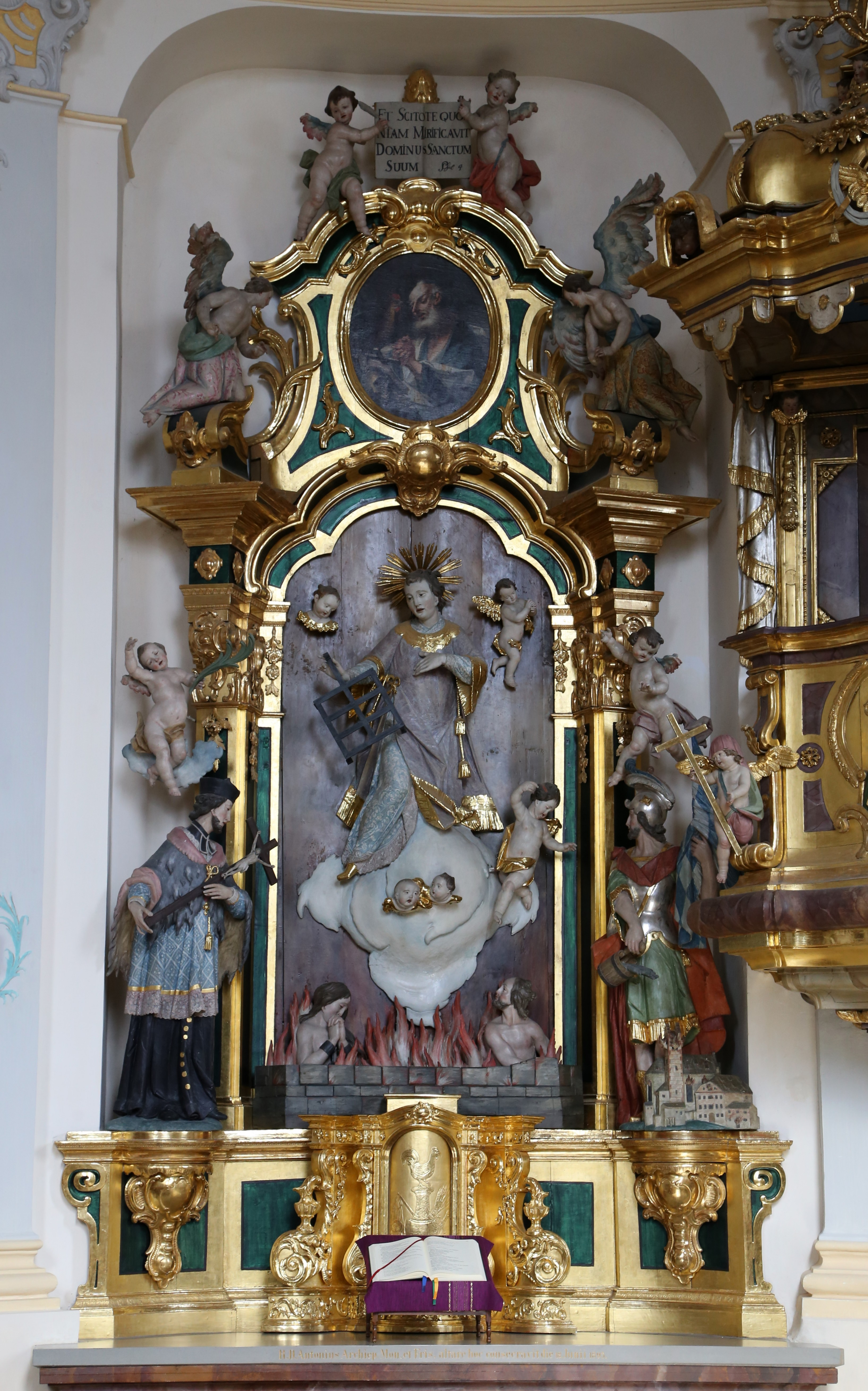 St.-Jakobus-Platz 1, Rohrdorf; Kath. Pfarrkirche St. Jakobus d.Ä., Saalbau mit Satteldach und Nordturm mit Spitzhelm, Turmunterteil spätgotisch, barocker Neubau 1769-73 von Leonhard Matthäus Gießl, 1854-55 Turmoberbau, 1864 neuromanische Vorhalle; mit Ausstattung; Friedhofsummauerung des 17./18. Jh.